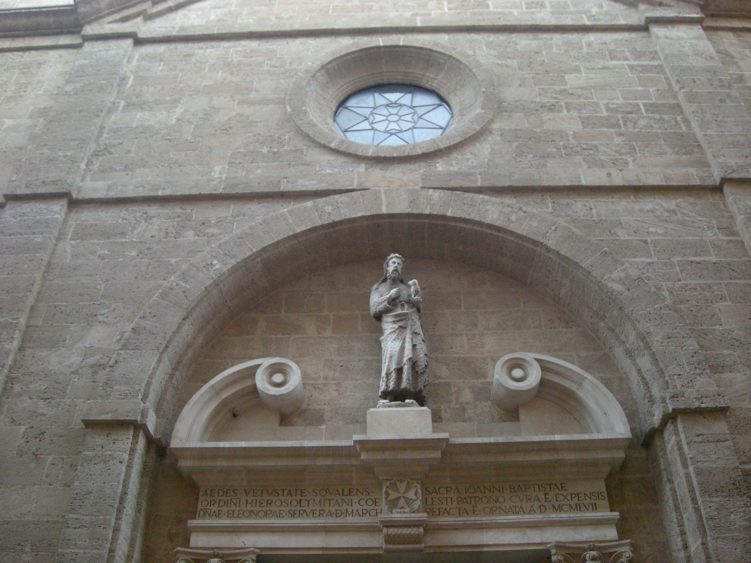 Sant Joan de Malta. Palma